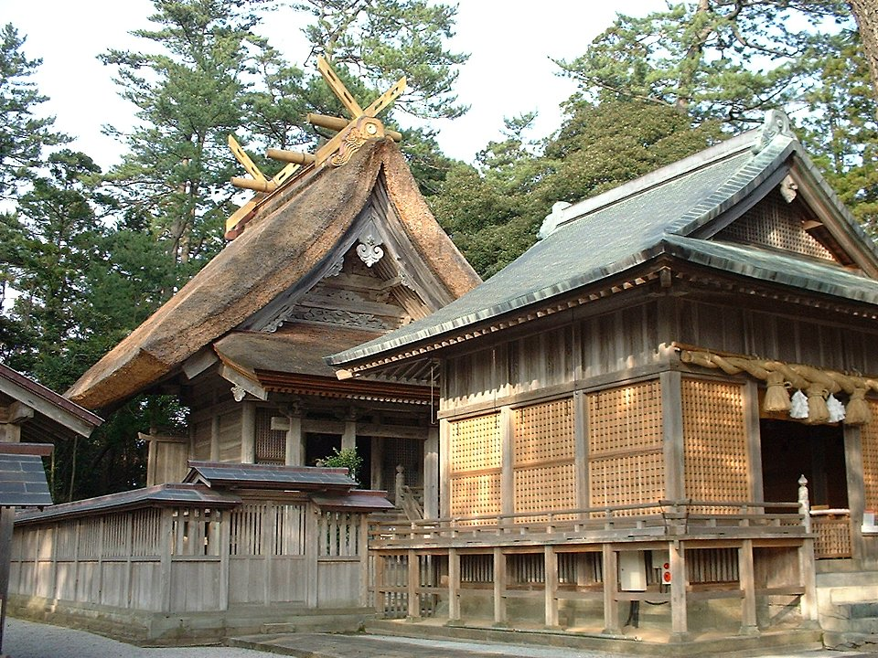 水若酢神社 本殿（左奥）と拝殿